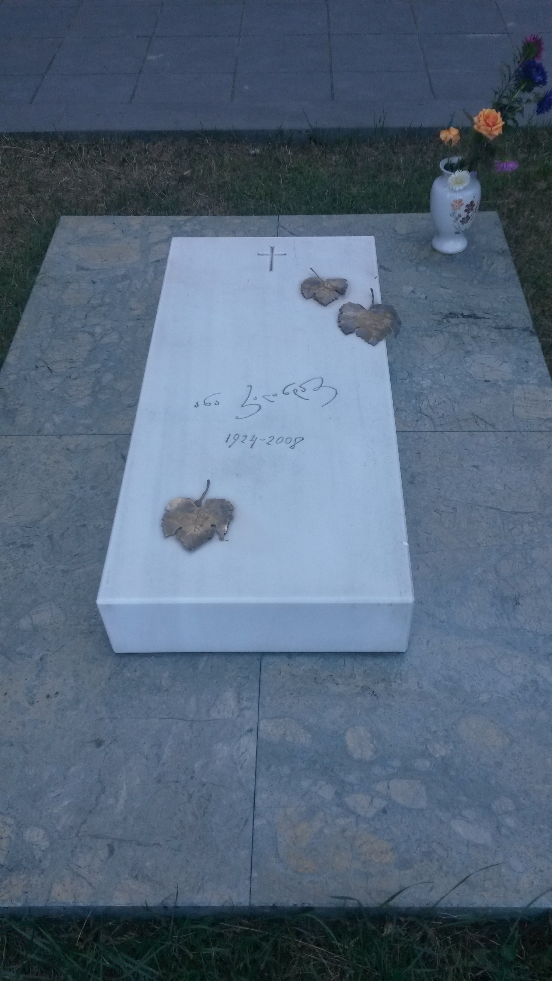 მთაწმინდის პანთეონი